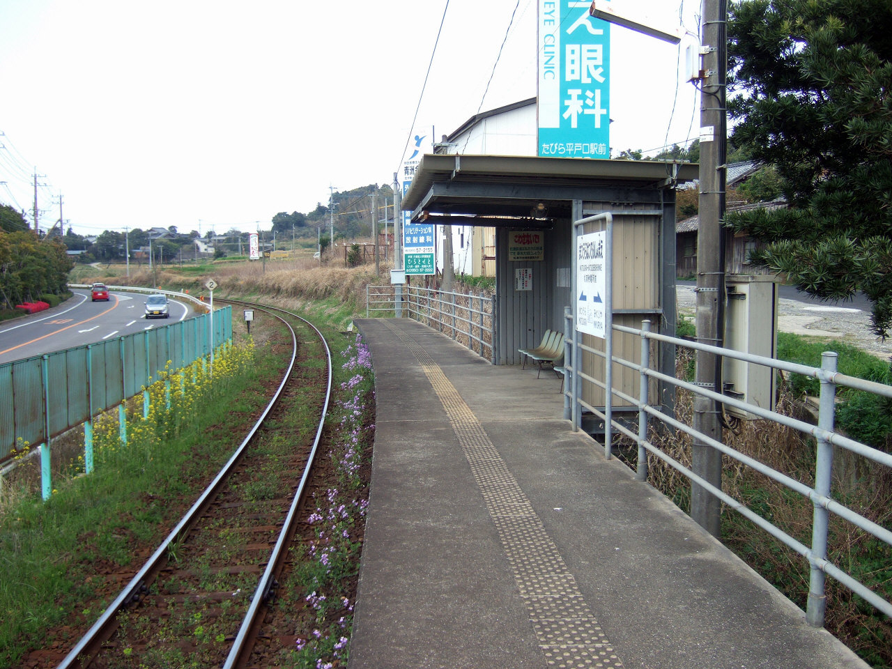 松浦鉄道松浦発電所前駅（Matsuura Railway Matsuura-Hatsudensyomae Station）